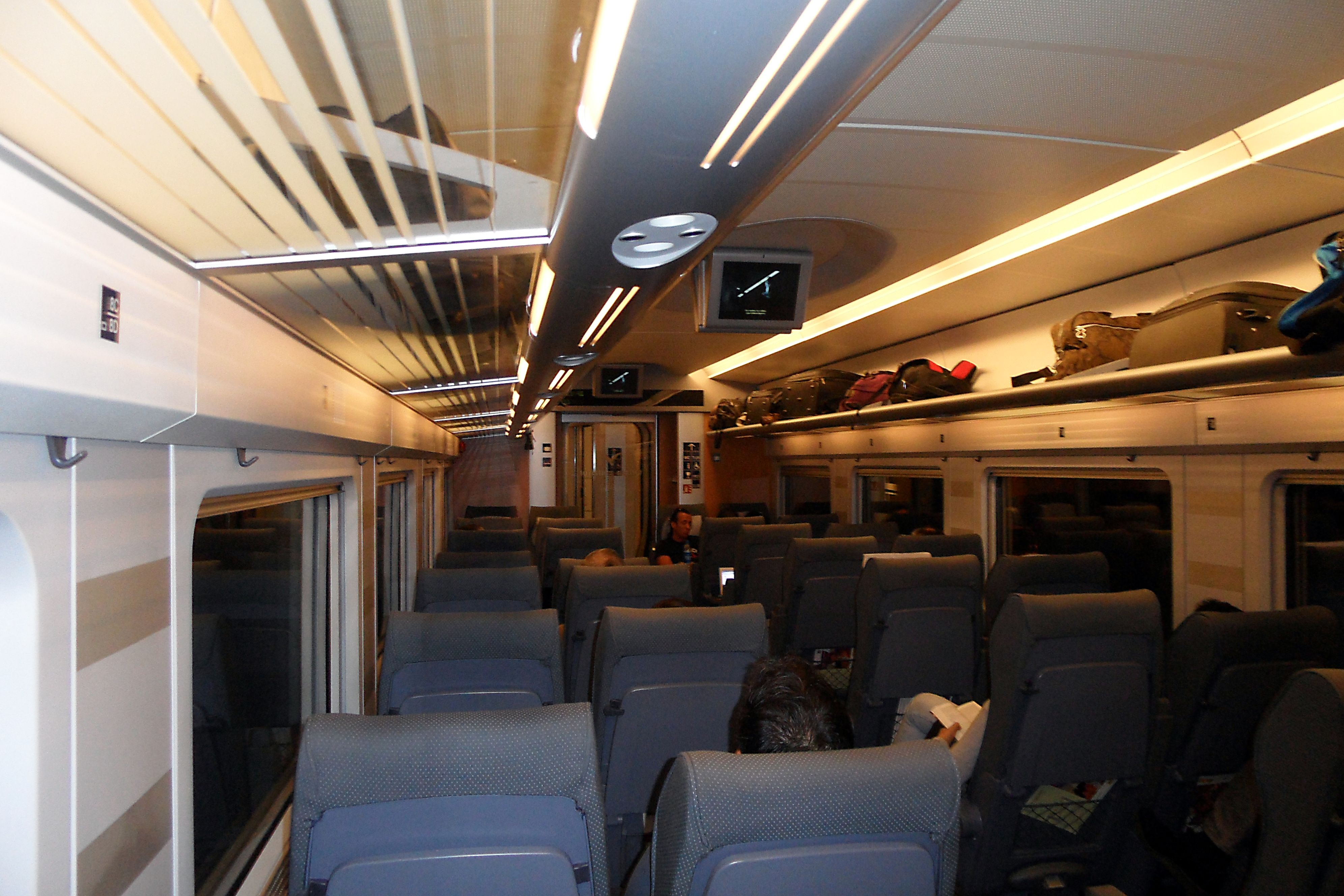 Turista-Mittelwagen, typisches Talgo-Pendular-Interieur, auf den zweiten Blick fällt die stabilere Ausführung der Wagenkästen auf.